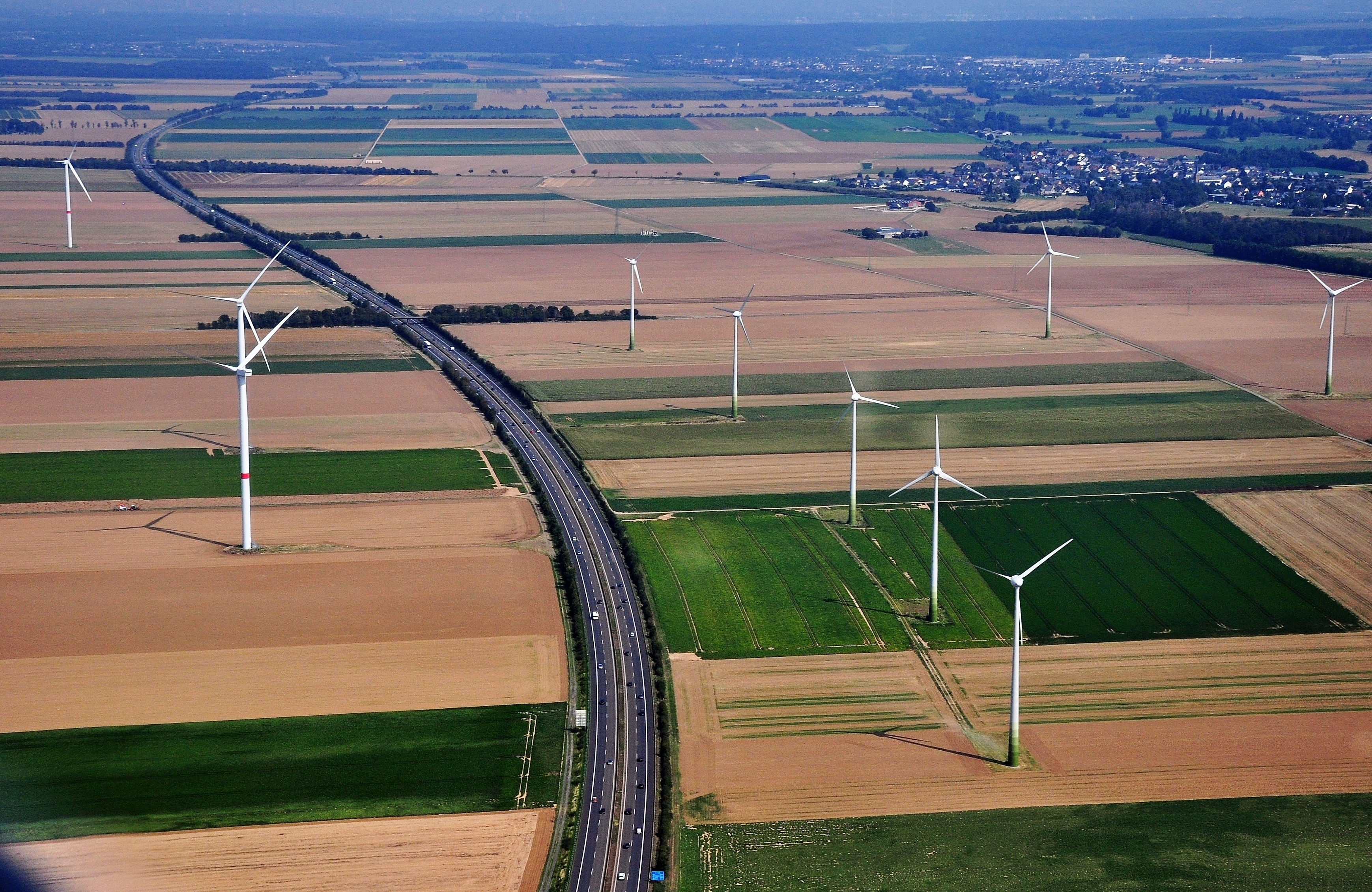 Bundesautobahn 1 und Windkraftanlagen in der Jülich-Zülpicher Börde nordwestlich Euskirchen bzw. südwestlich Lommersum (Gemeinde Weilerswist). Blick nach Norden auf den Höhenzug der Ville (oberer Bildrand)